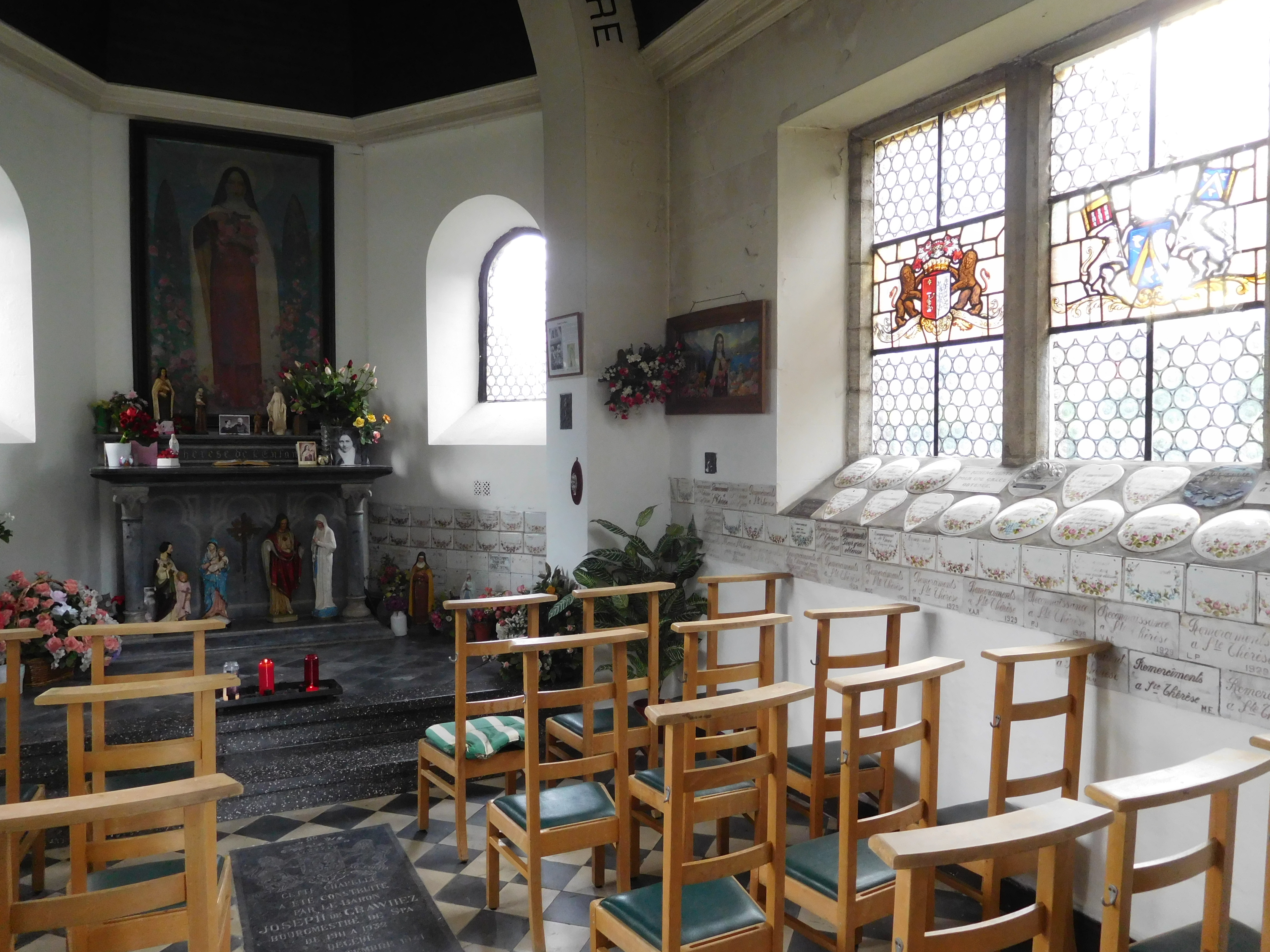 Intérieur de la chapelle Sainte-Thérèse à Spa. Les murs sont couverts d'exvotos.